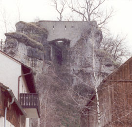 Burg Krögelstein, Schwibbogen mit Fensterschlitzen, selbst fotografiert, MacElch (Rainer Kunze), 1994